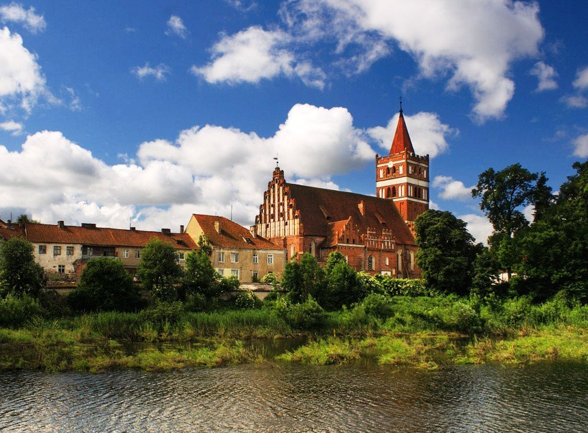 Свято-Георгиевский храм г.Правдинск